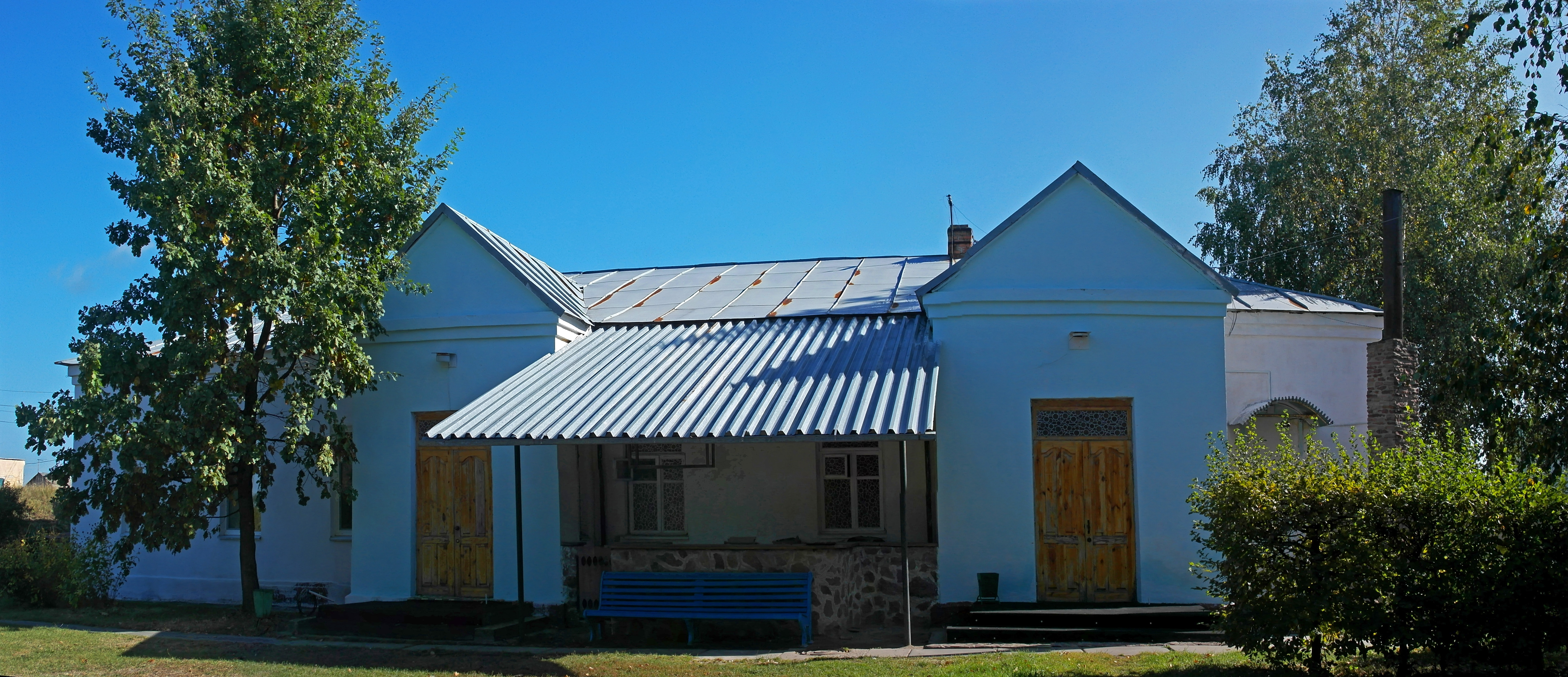 Ямщицька (мур.), село Гурівщина, шосе Київ — Житомир, 32-й км